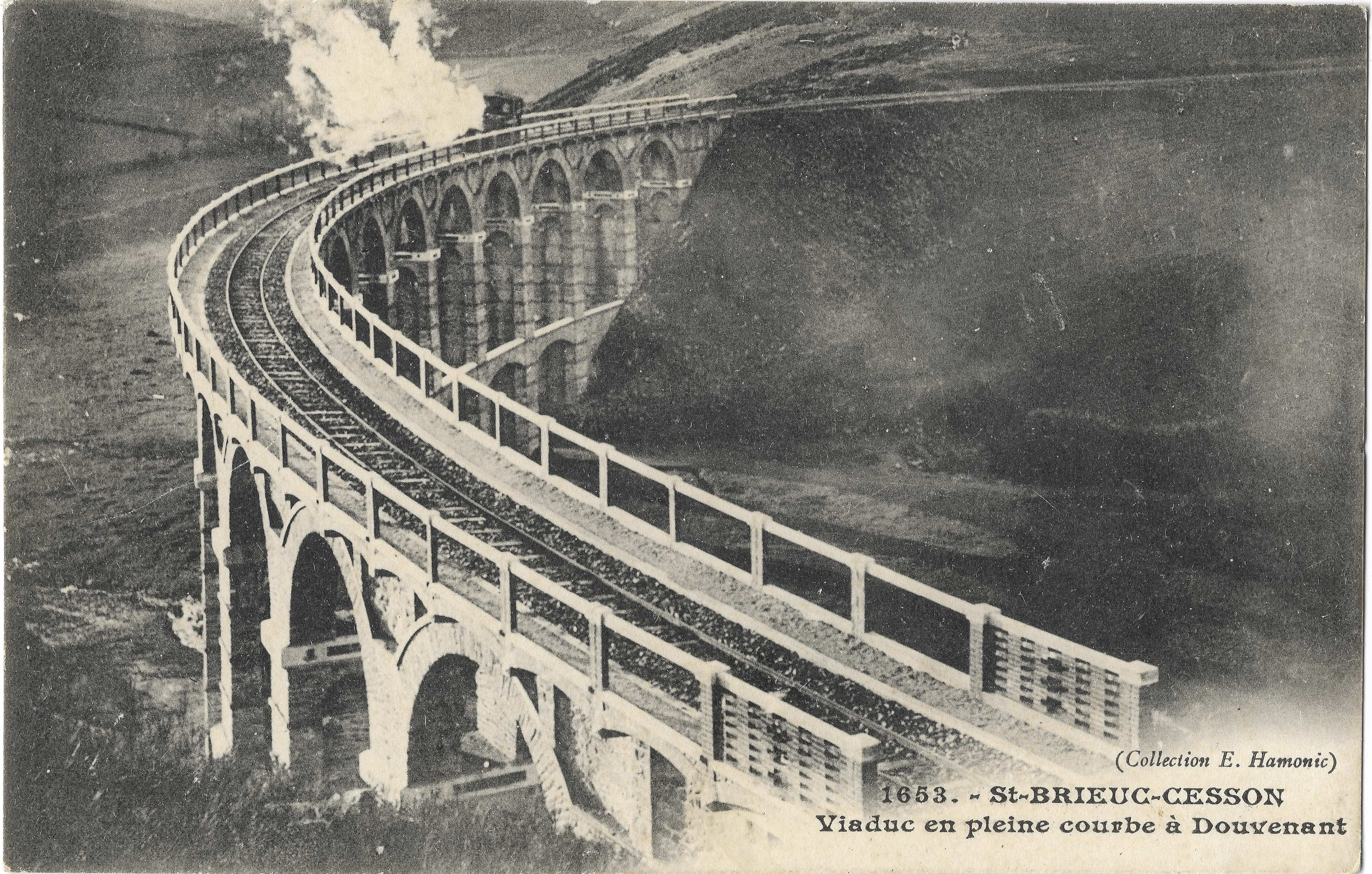 Viaduc en courbe de Douvenant, près de Saint-Brieuc. Collection E.Hamonic.